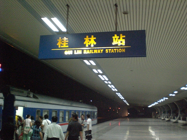 桂林火车站一站台